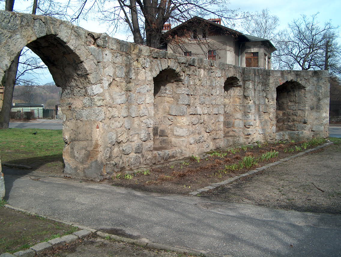 Mury obronne we Lwówku Ślaskim. Basteja.